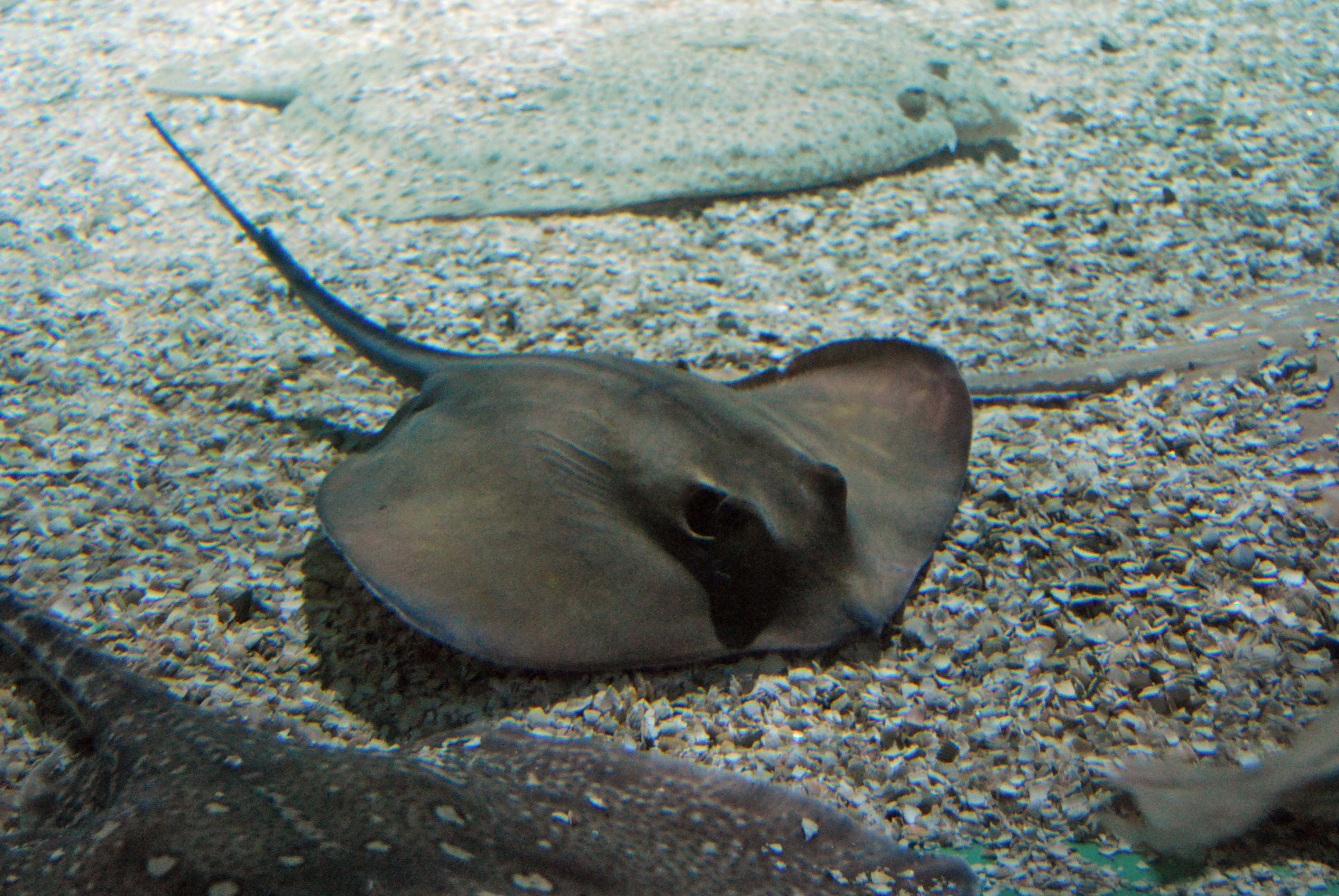 Rochen im Sea Life Konstanz